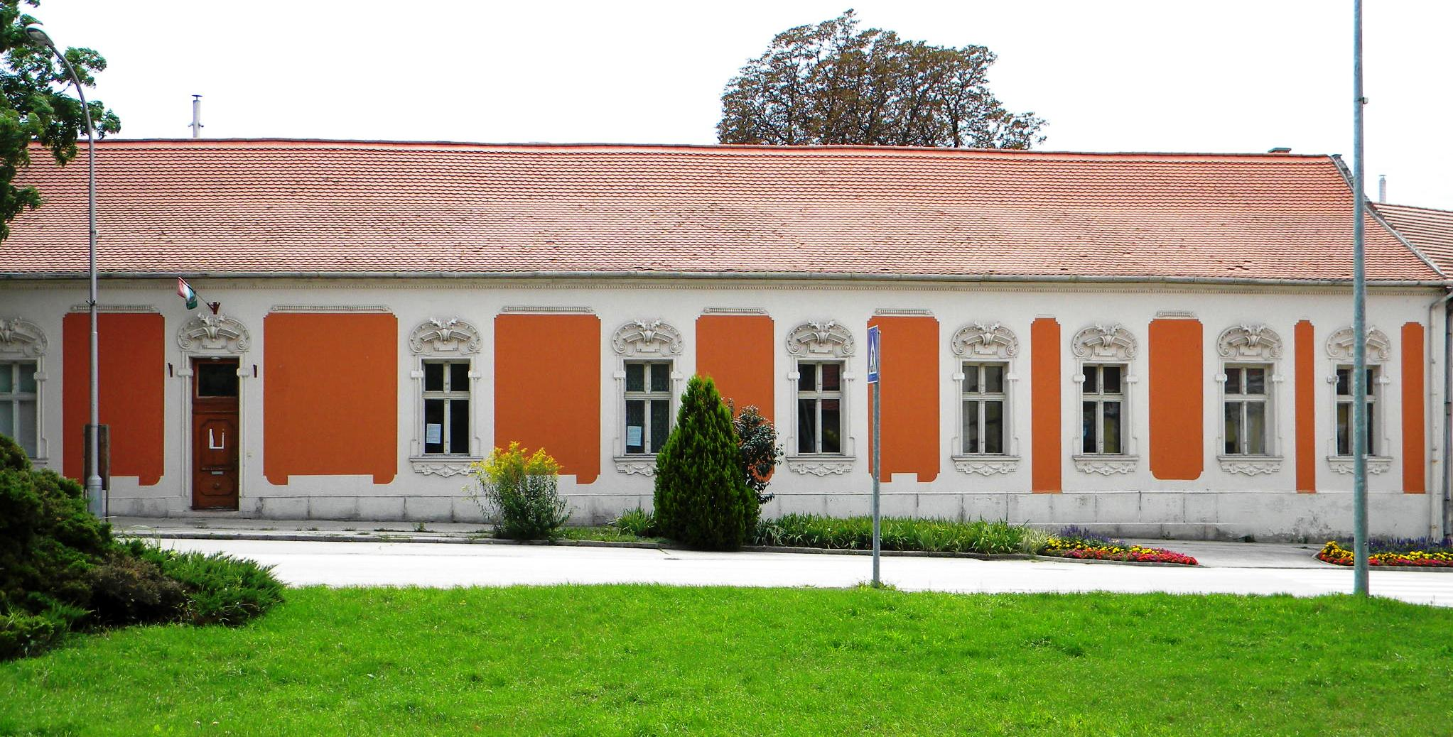 Az épületben, mely Tatán a Kossuth tér 10. szám alatt található, működött a Menner Bernát Zeneiskola. Műemlék ID 4550. - Komárom-Esztergom m., Tata, Kossuth tér 10. This is a photo of a monument in Hungary, Identifier: 4550